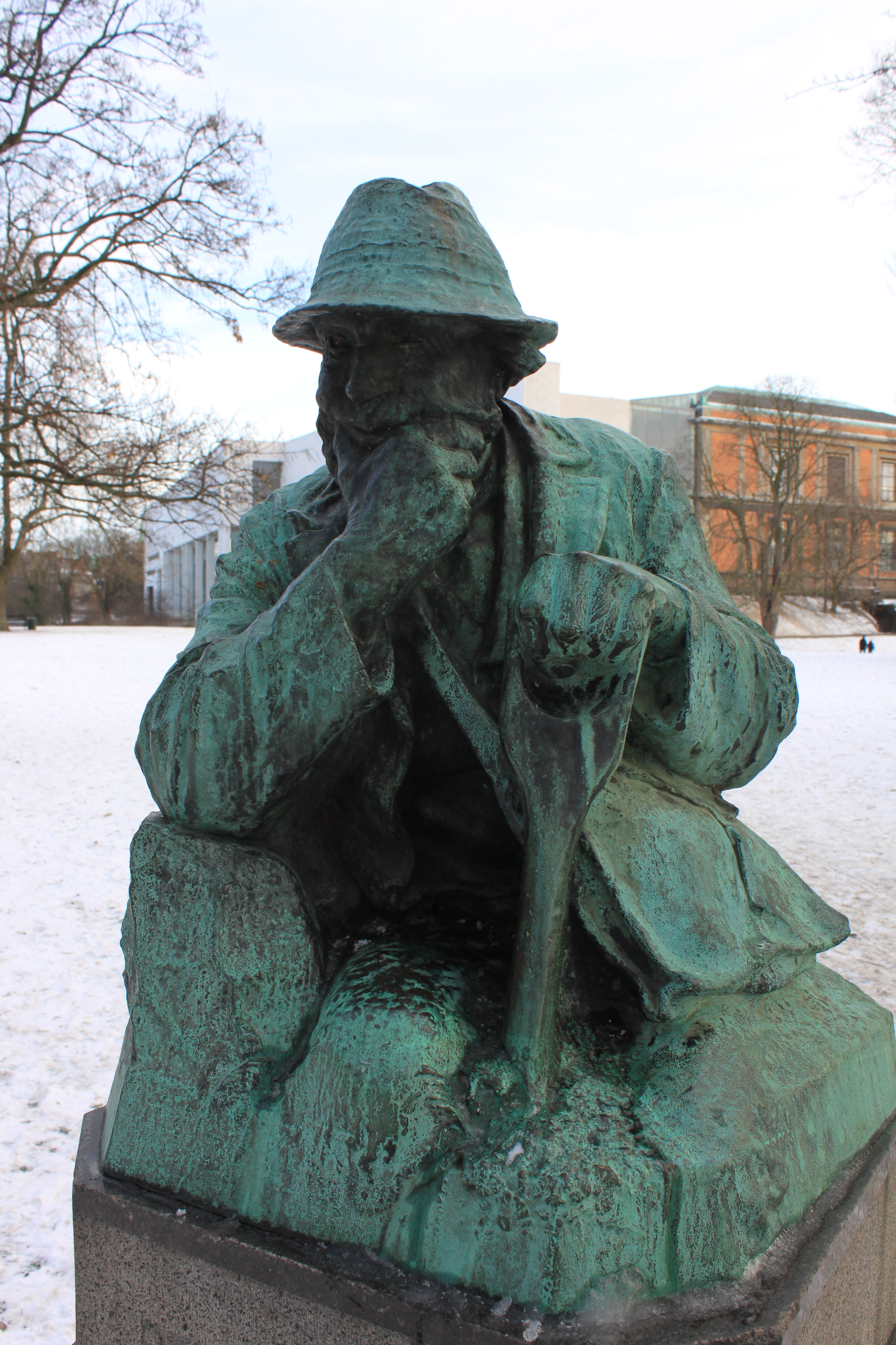 "Det lider mot skymning", skulptur af Aron Jerndahl 1902, støbt i bronce af Otto Meyer Fud., Stockholm. Skænket af Legatet Albertina og opstillet i 1904 i Østre Anlæg, indgangen ved Sølvtorvet, København, Danmark.